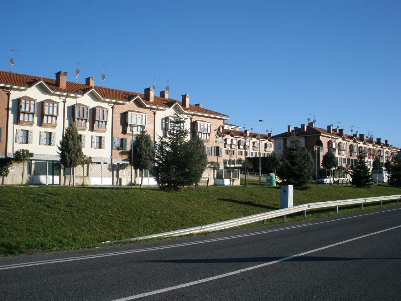 Legutio (Álava)